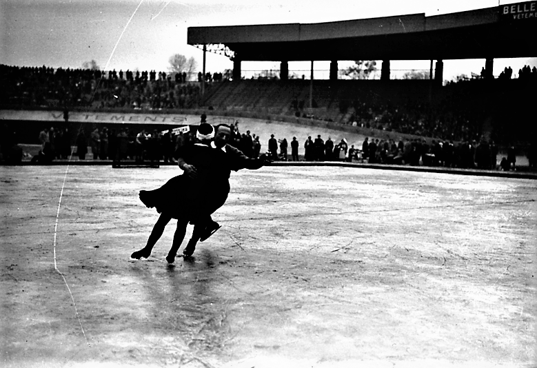 Parc des Princes (Paris) La fête de la glace au Parc des Princes : exhibition de Mme Brown et Mr Pigneron (1932 ou 1933)